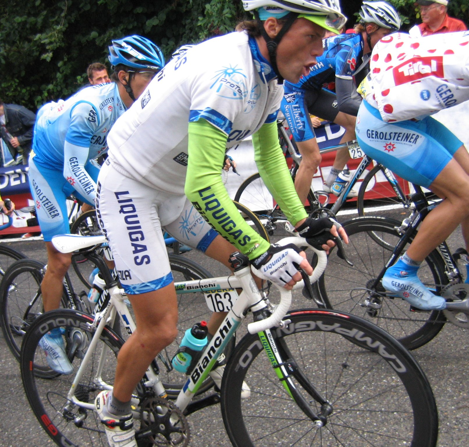 Danilo di Luca en el Tour de Alemania 2005 en: Danilo di Luca at Tour of Germany 2005, stage Friedrichshafen–Singen, at Hohentwiel de: Danilo di Luca bei der Deutschland-Tour 2005, Etappe Friedrichshafen–Singen, am Hohentwiel